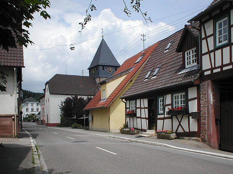 Dorfstraße von Aglasterhausen-Michelbach